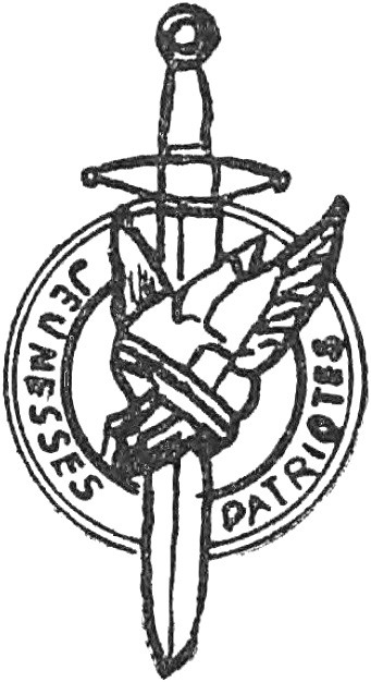 Emblème des Jeunesses Patriotes.